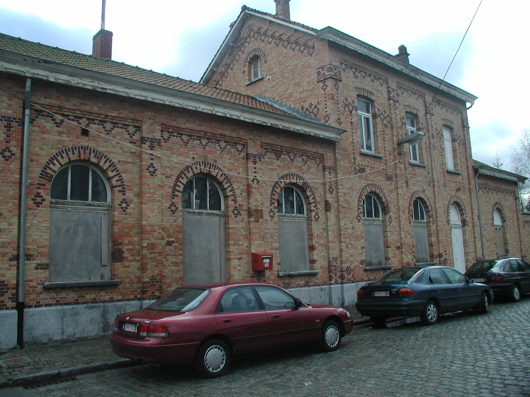 zelf getrokken. Mag voor elk doeleind gebruikt worden.